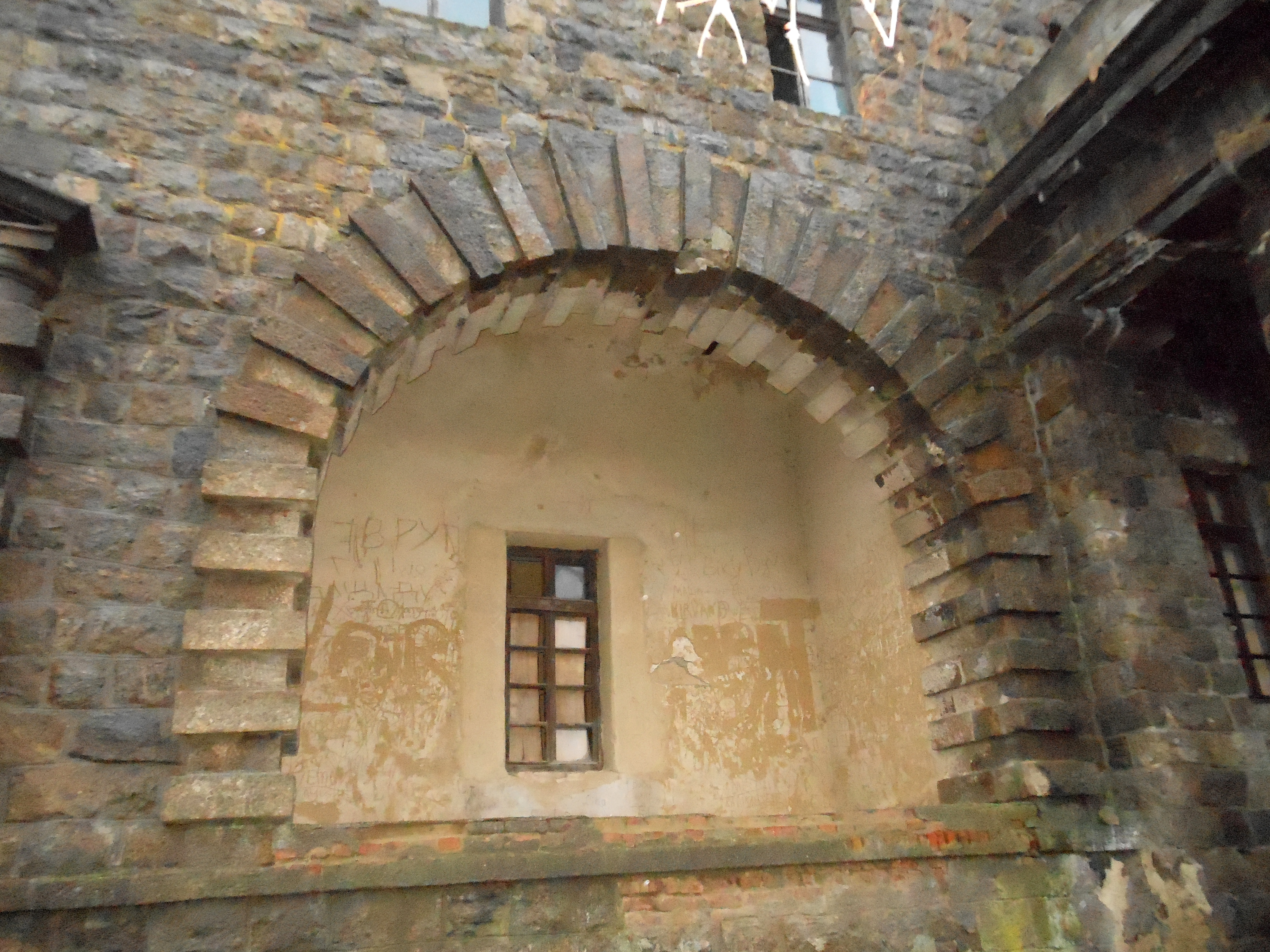 Палац, Хмільник, вул. Шевченка, 1